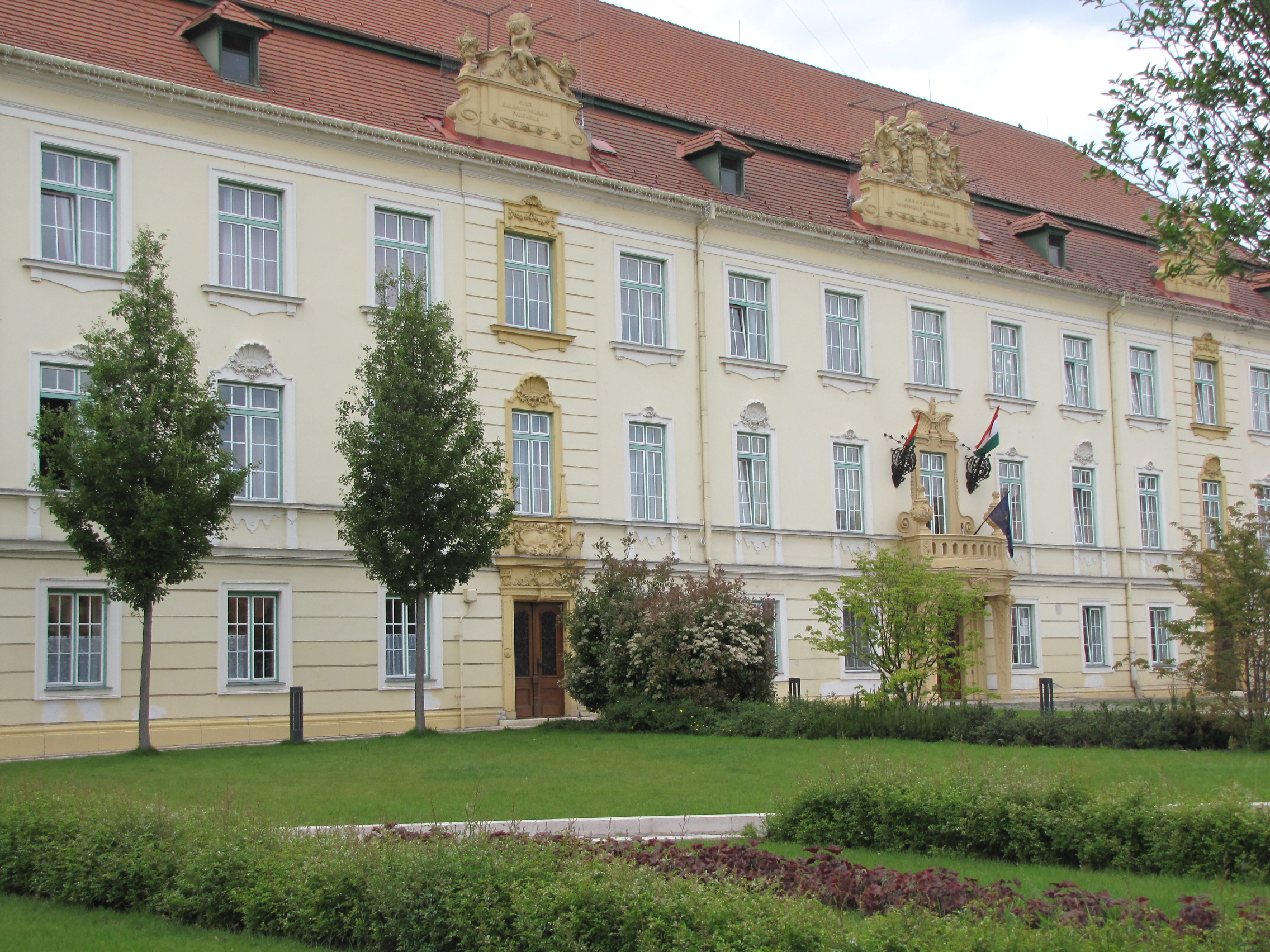 Hungary, Komárom, a Petőfi Sándor általános iskola a Szabadság téren